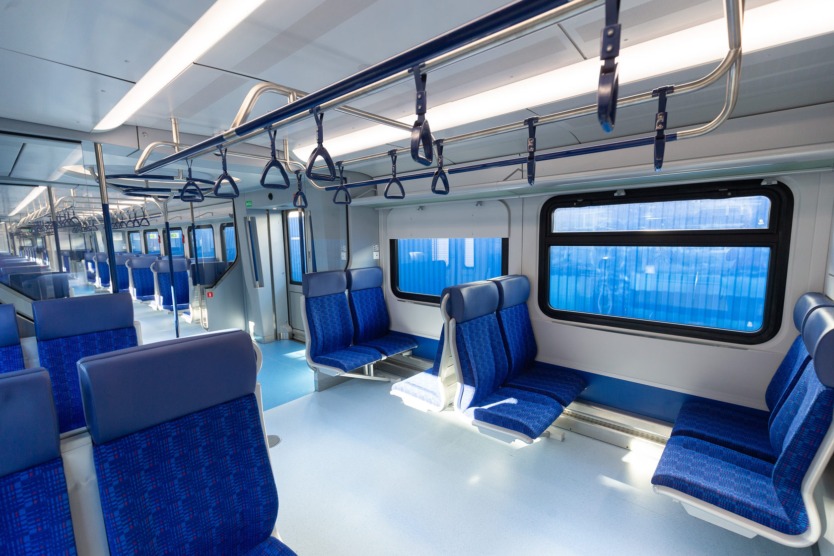 Сиденья в салоне нового типа электропоезда ЭГ2Тв